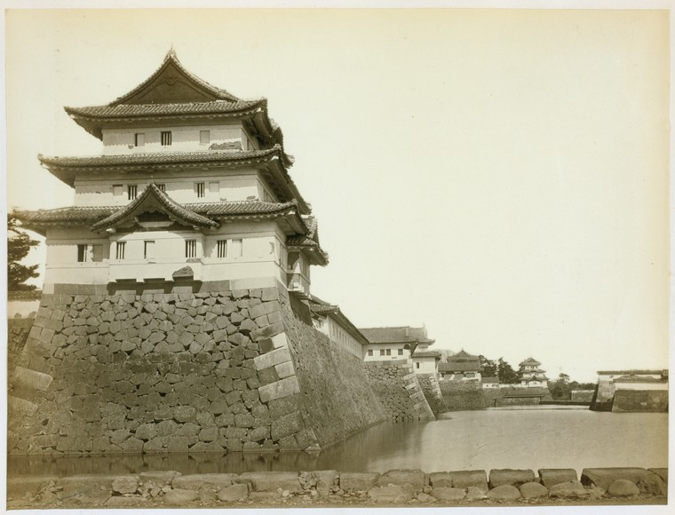 江戸城二の丸蓮池巽三重櫓